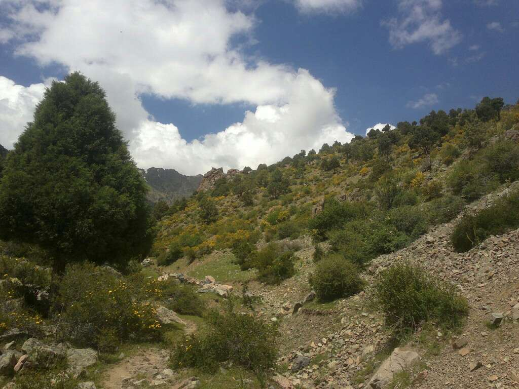 Тоҷикӣ: Надок чангалзор дар шимоли Тоҷикистон